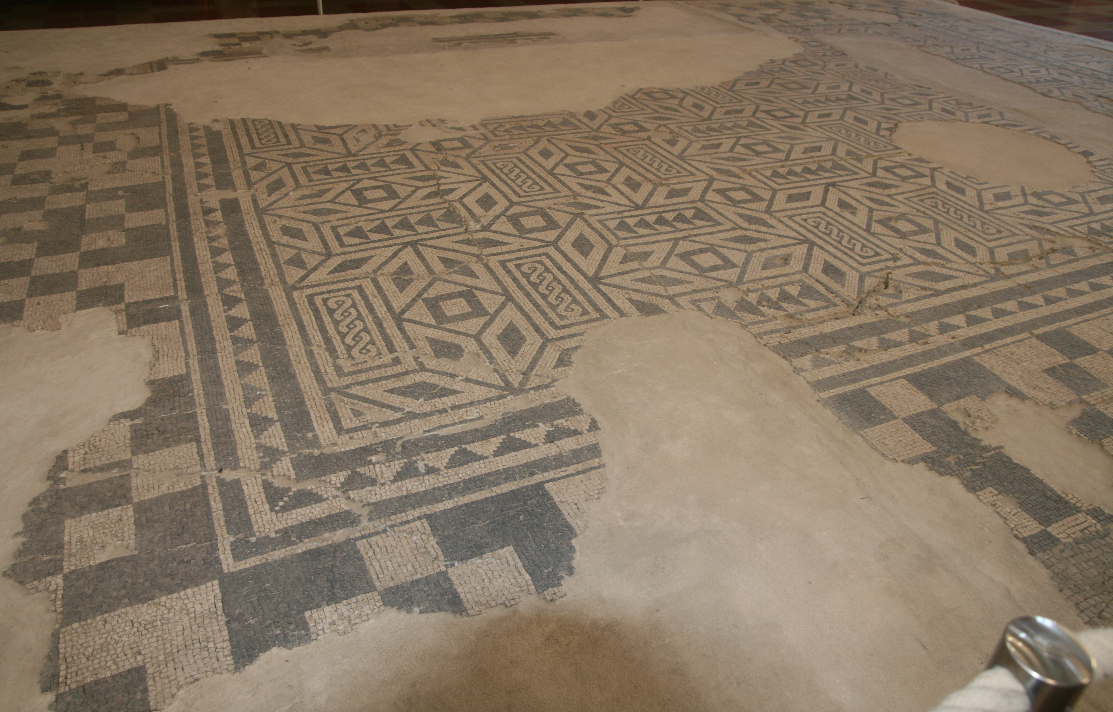 Palazzo comunale This is a photo of a monument which is part of cultural heritage of Italy.